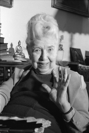 Szepes Mária portréja (Budapest, 1992)